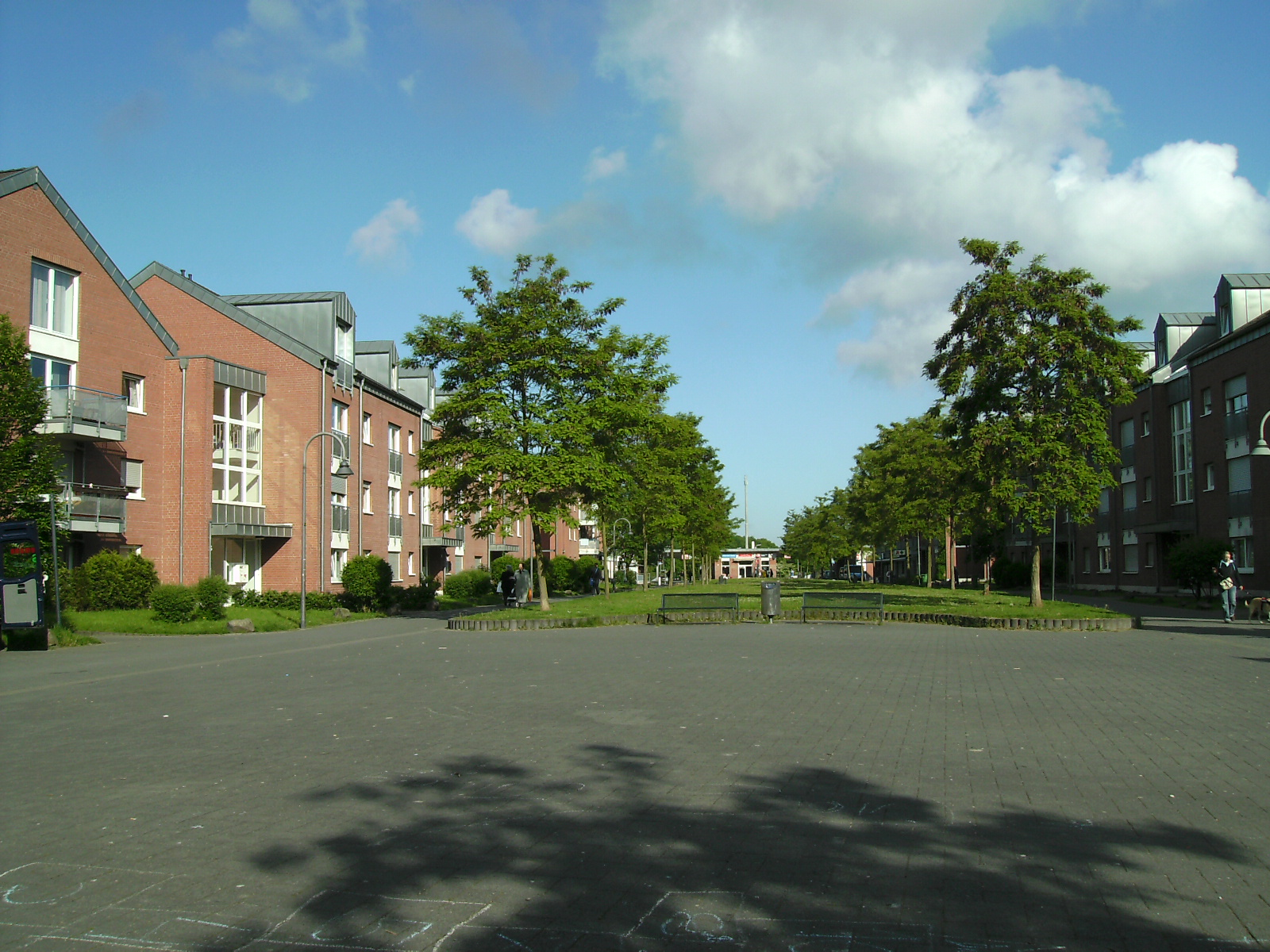 Mehrfamilienhäuser in Blumenberg Mitte